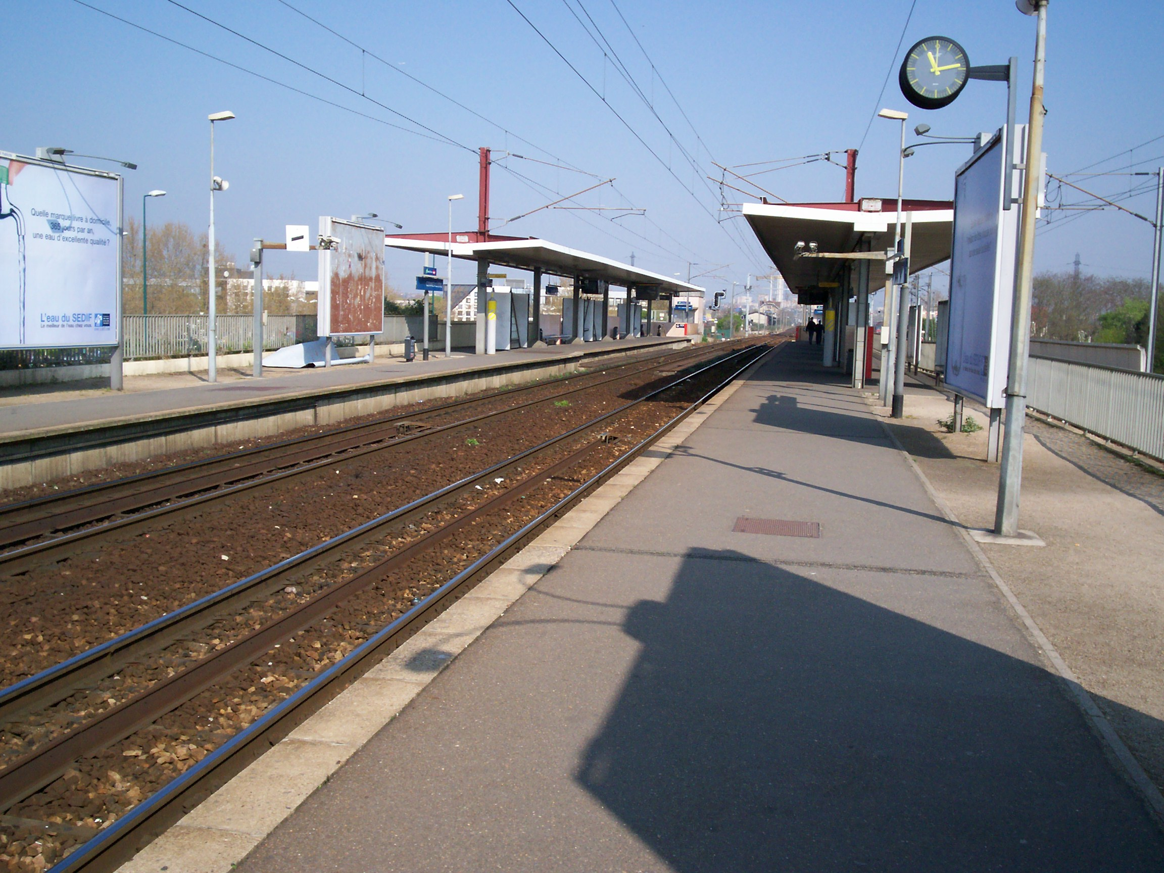 Gare de Gennevilliers